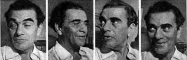 Imagens do professor José Oticica retiradas de matéria da revista O Cruzeiro, 23 de maio de 1953 cujo título era "Confissões de um Anarquista Emérito.